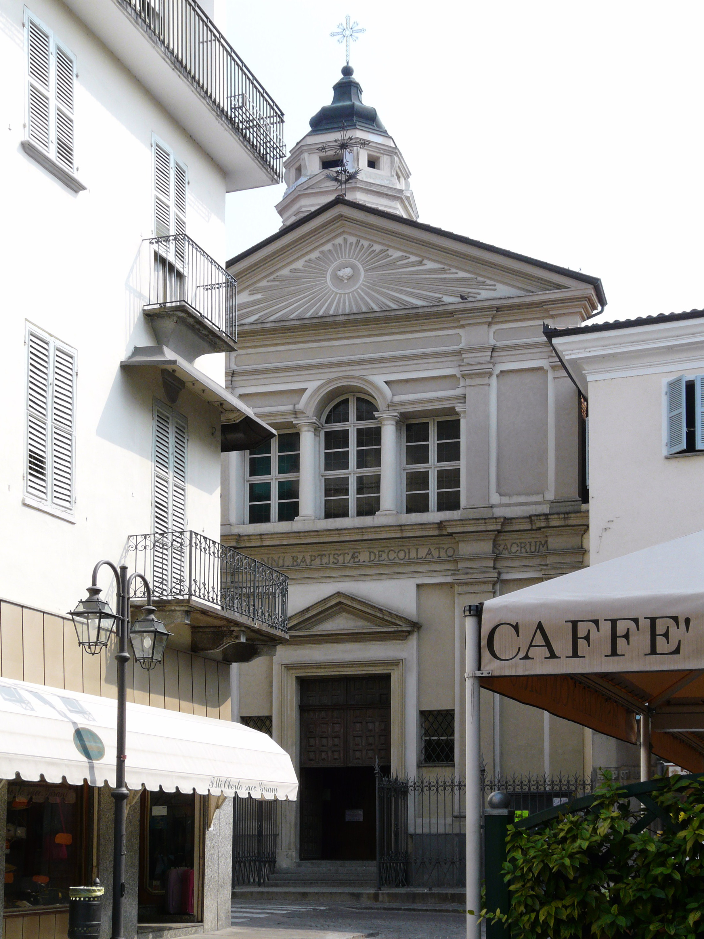 Chiesa di San Giovanni Decollato, Bra, Piemonte, Italia